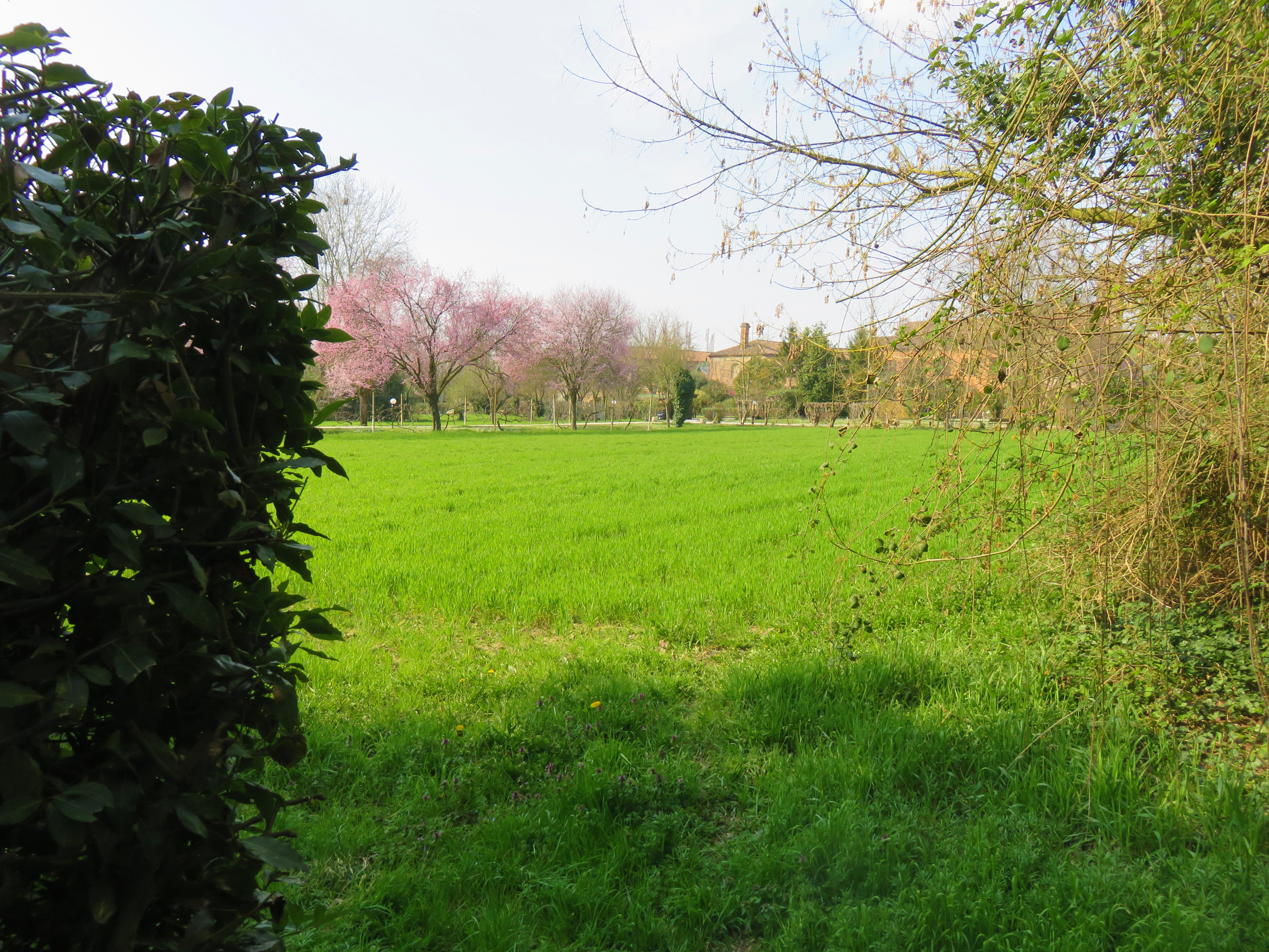 Lo spazio dentro le mura di Ferrara, nella zona della Certosa e del Cimitero ebraico. Sullo sfondo a destra, seminascosta, la chiesa di San Cristoforo